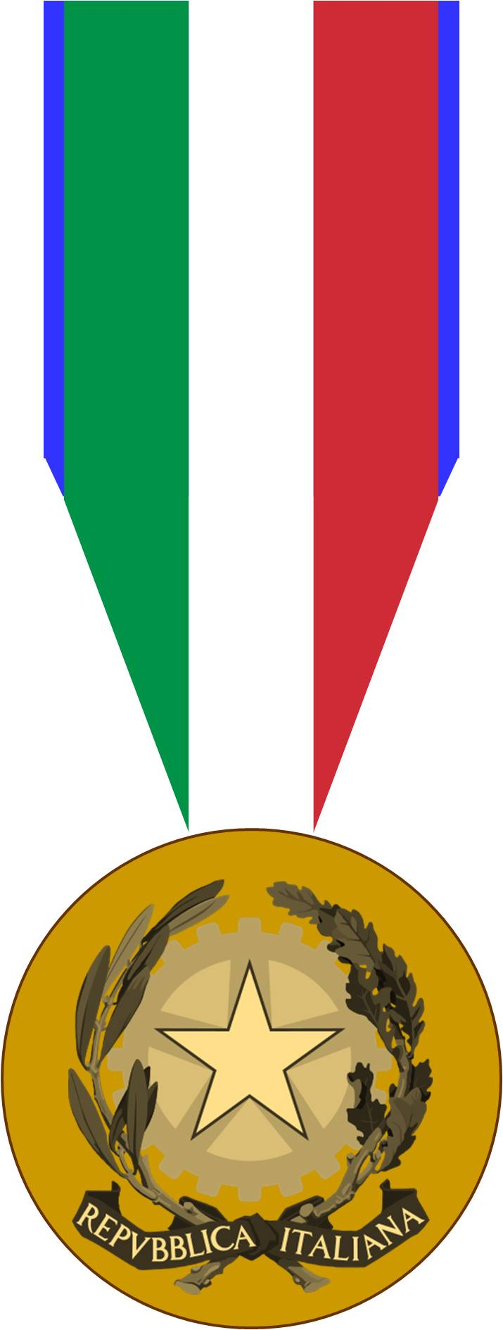 Medaglia ai benemeriti della scienza e della cultura